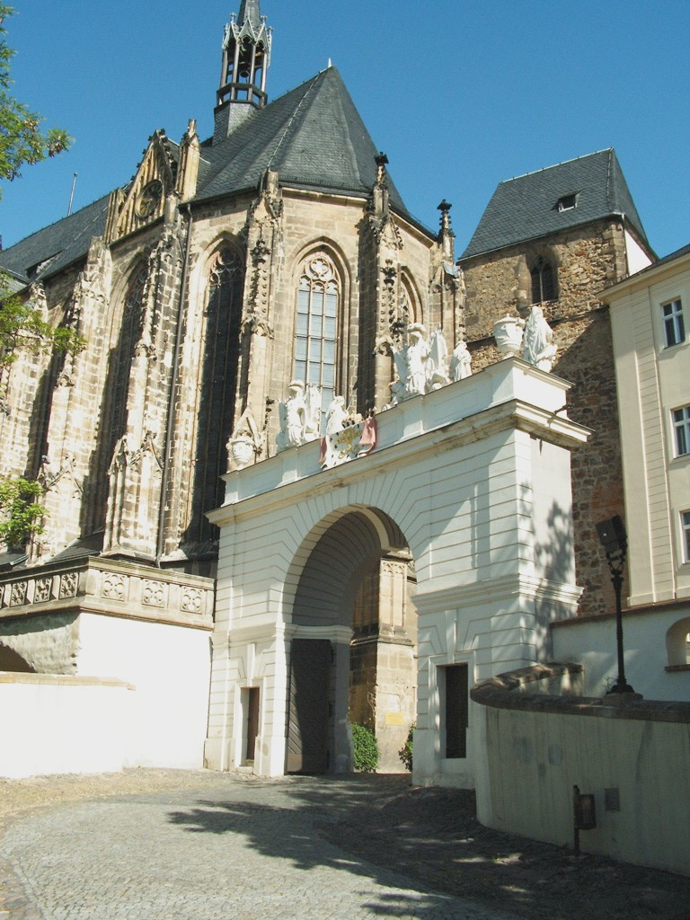 Schloss Altenburg